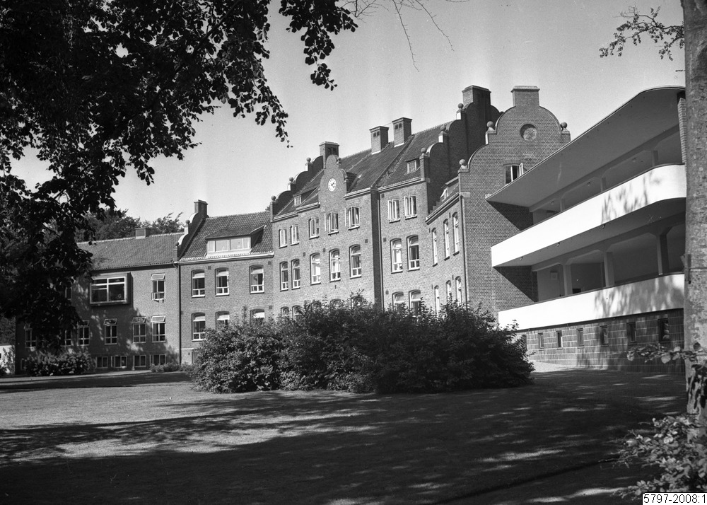 Kungshults sanatorium utanför Helsingborg 1947.